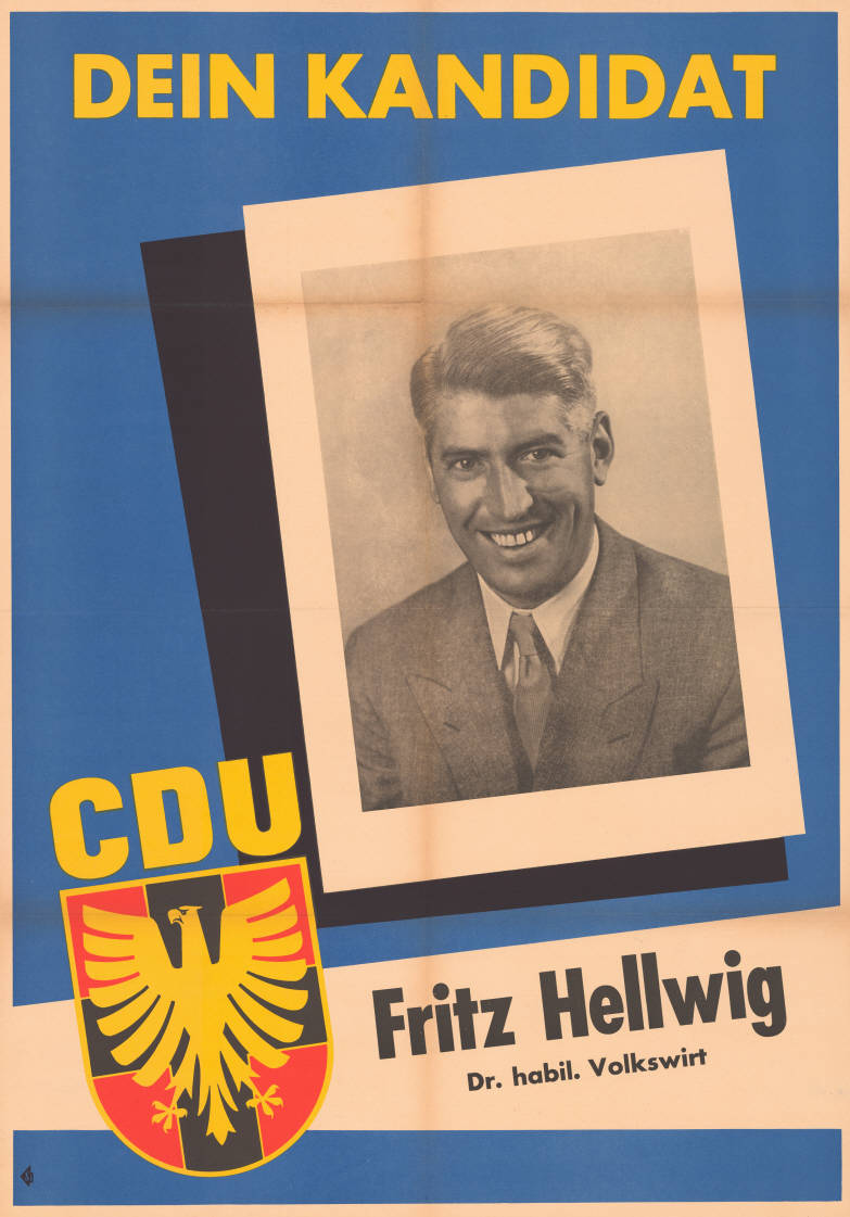 Dein Kandidat CDU Fritz Hellwig Dr. habil. Volkswirt Abbildung: Porträtfoto Plakatart: Kandidaten-/Personenplakat mit Porträt Objekt-Signatur: 10-001: 592 Bestand: Plakate zu Bundestagswahlen (10-001) GliederungBestand10-18: Plakate zu Bundestagswahlen (10-001) » Die 2. Bundestagswahl am 6. September 1953 » CDU » Mit Porträtfoto Lizenz: KAS/ACDP 10-001: 592 CC-BY-SA 3.0 DE